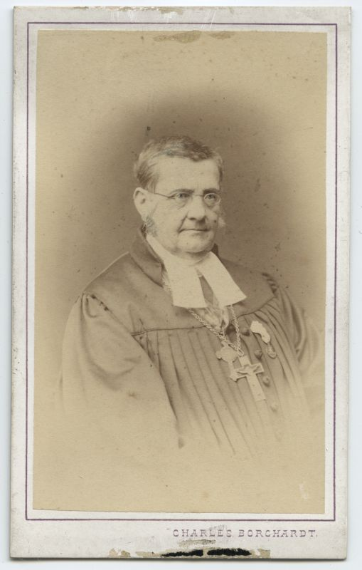 Woldemar Eugen Grohmann, Türi Püha Martini koguduse õpetaja 1828–1874